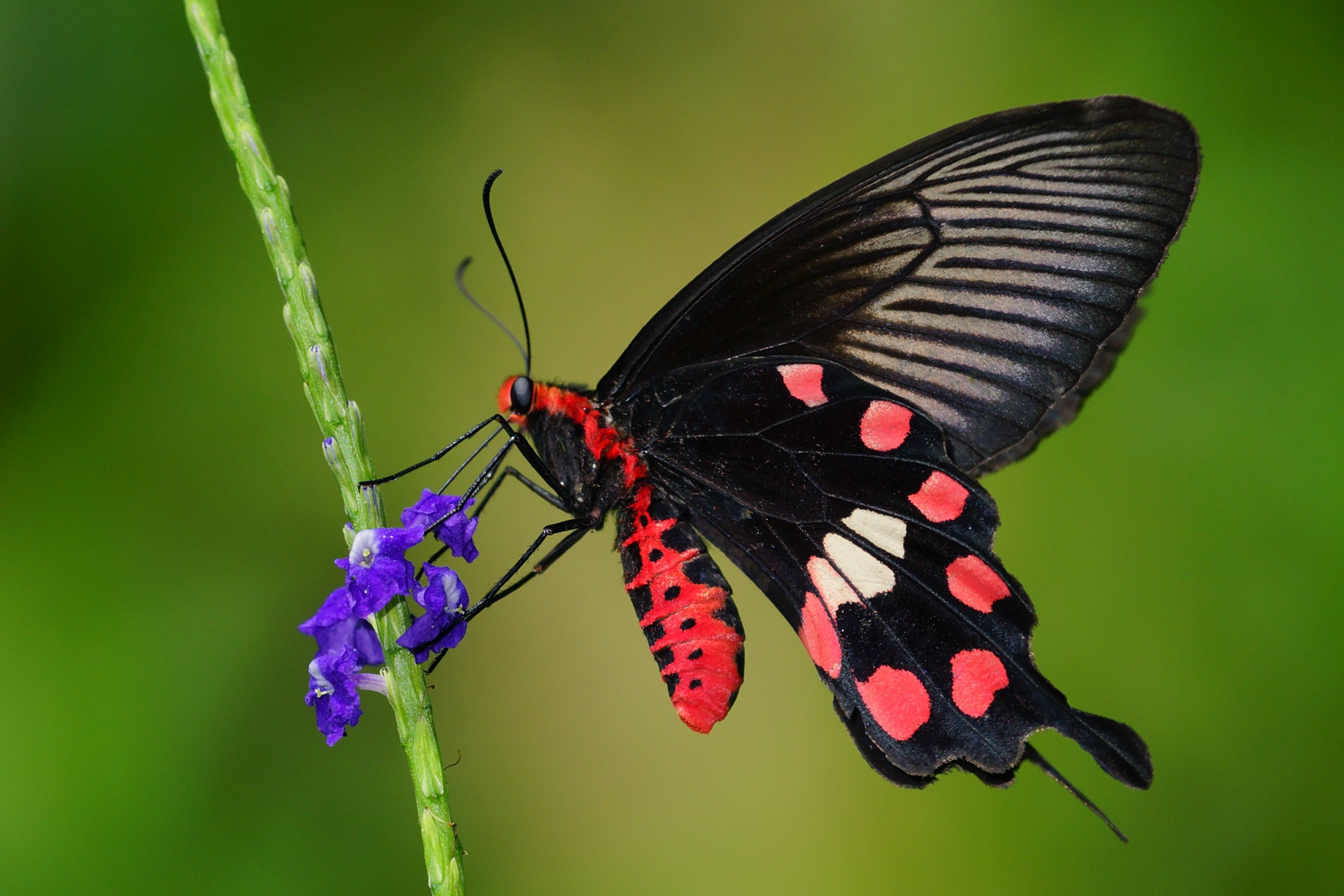 紅珠鳳蝶 Pachliopta aristolochiae interposita